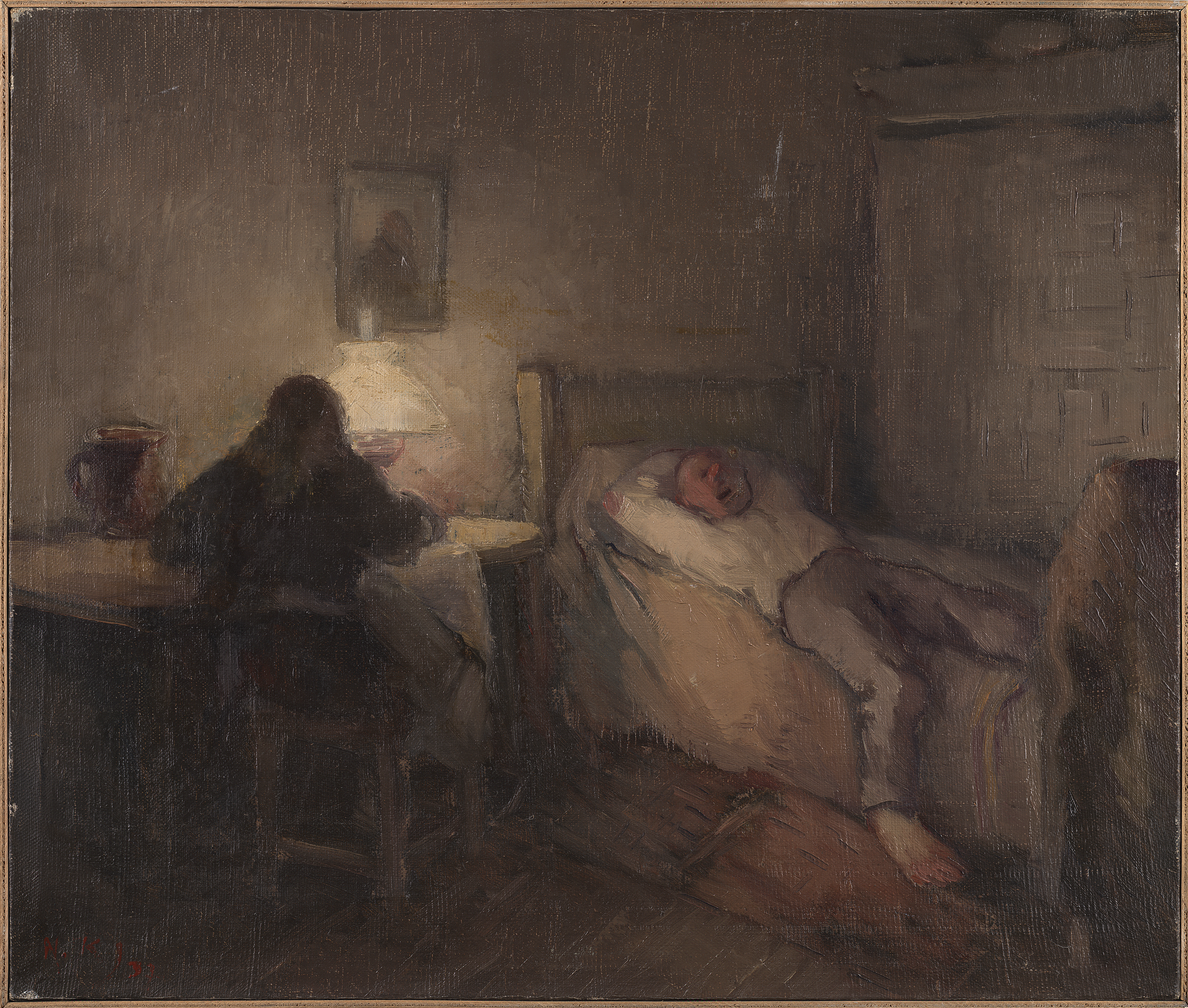 "Õhtu" (1937). Õlimaal lõuendil. Kõrgus 49,5 cm ja laius 57,0 cm.